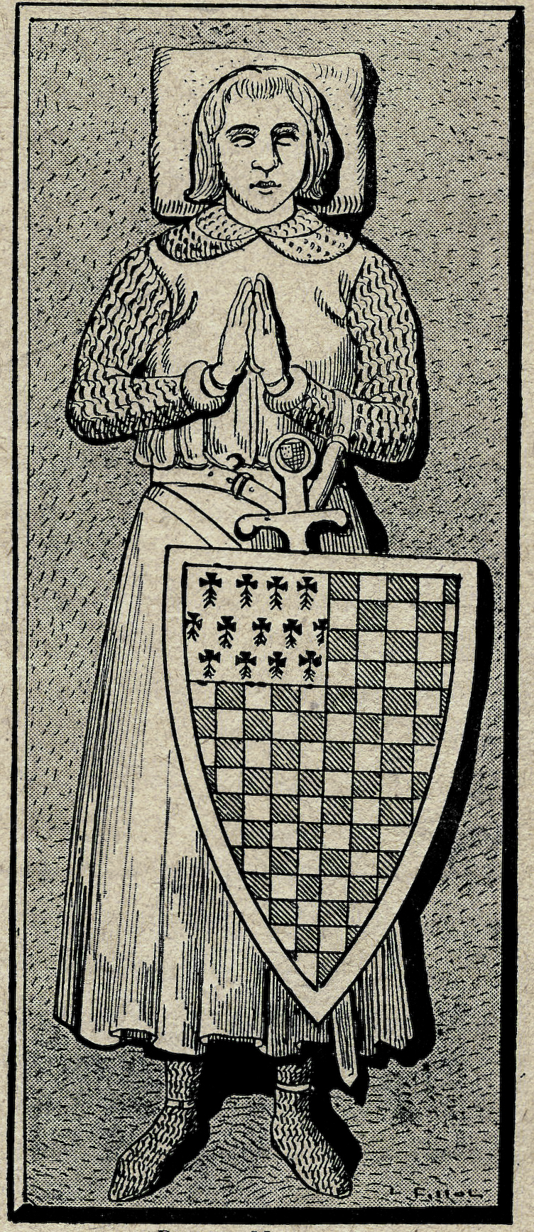 Gravure de Pierre Mauclerc